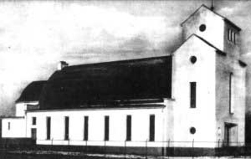 Кирха в промышленно-рабочем районе Кёнигсберга — Понарте.